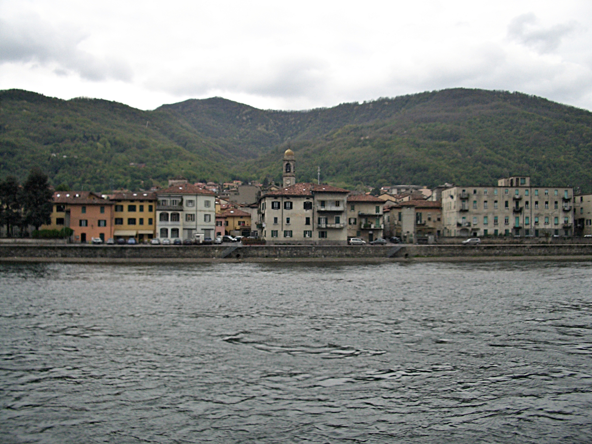 Panorama di Olginate.